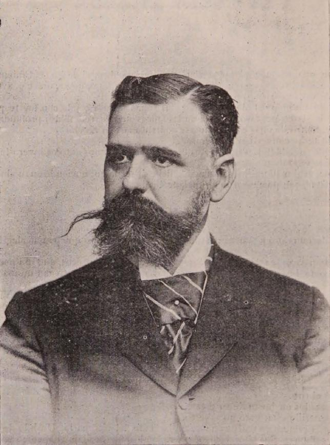 Joaquín Walker Martínez; (Copiapó, 16 de agosto de 1853 – Santiago, 13 de octubre de 1928) fue un abogado, diplomático, periodista y político conservador chileno.